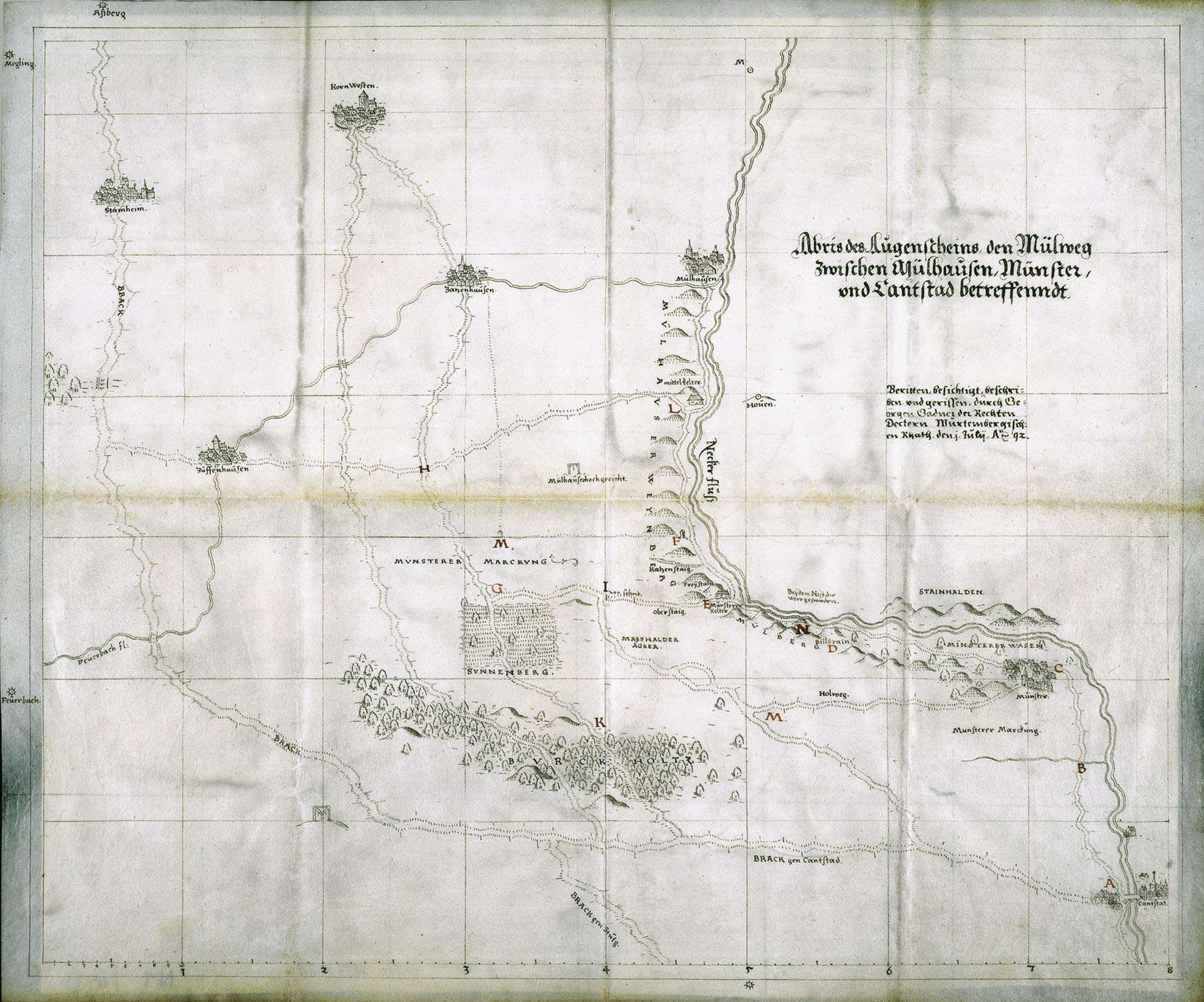 „Abris des Augenscheins den Mülweg zwischen Mülhausen, Münster und Cantstad betreffendt. Beritten, besichtigt, beschriben und gerissen durch Georgen Gadner der Rechten Doctorn, Würtembergischen Rath, den 1. Julii Anno 1592“